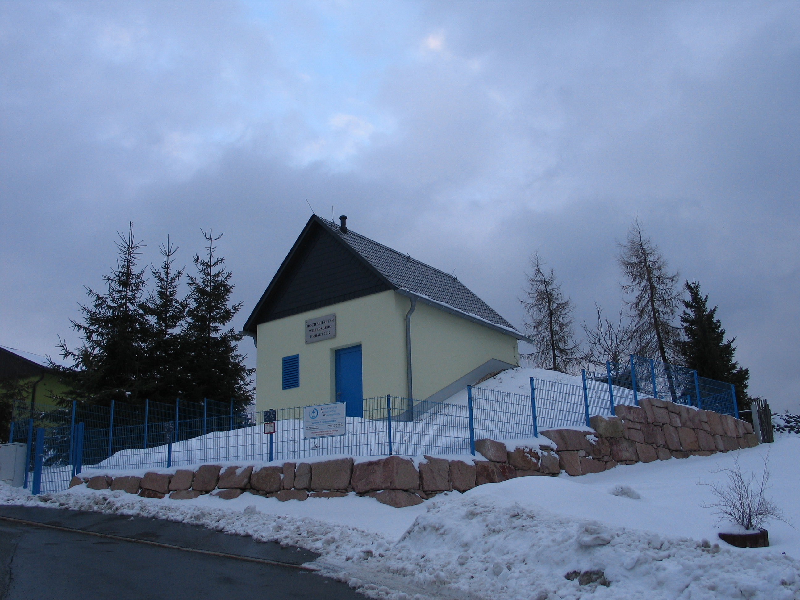 Trinkwasserhochbehälter des Zweckverbandes Wasserwerke Westerzgebirge